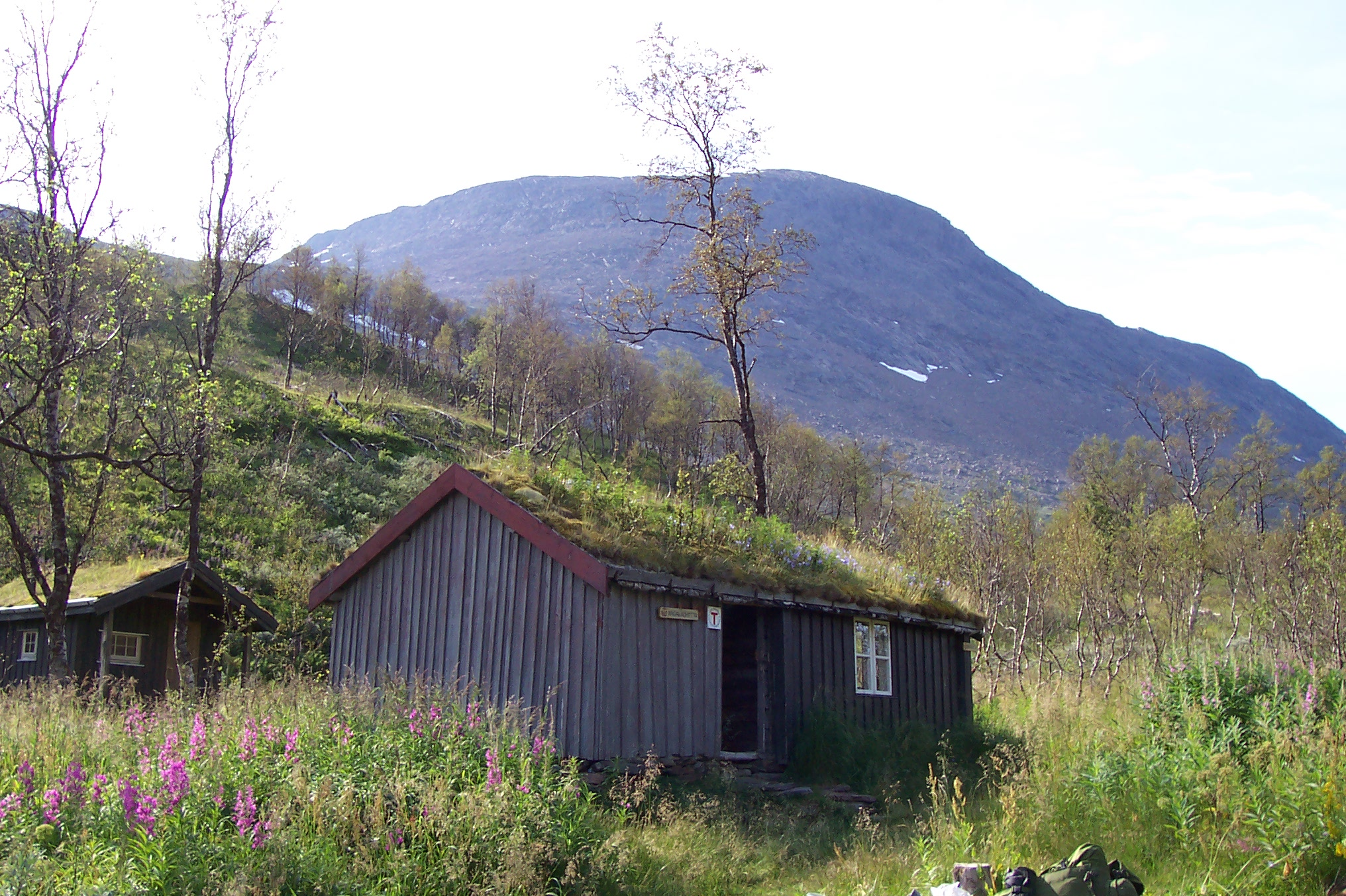 Argaladhytta i Junkerdals nationalpark, Norge